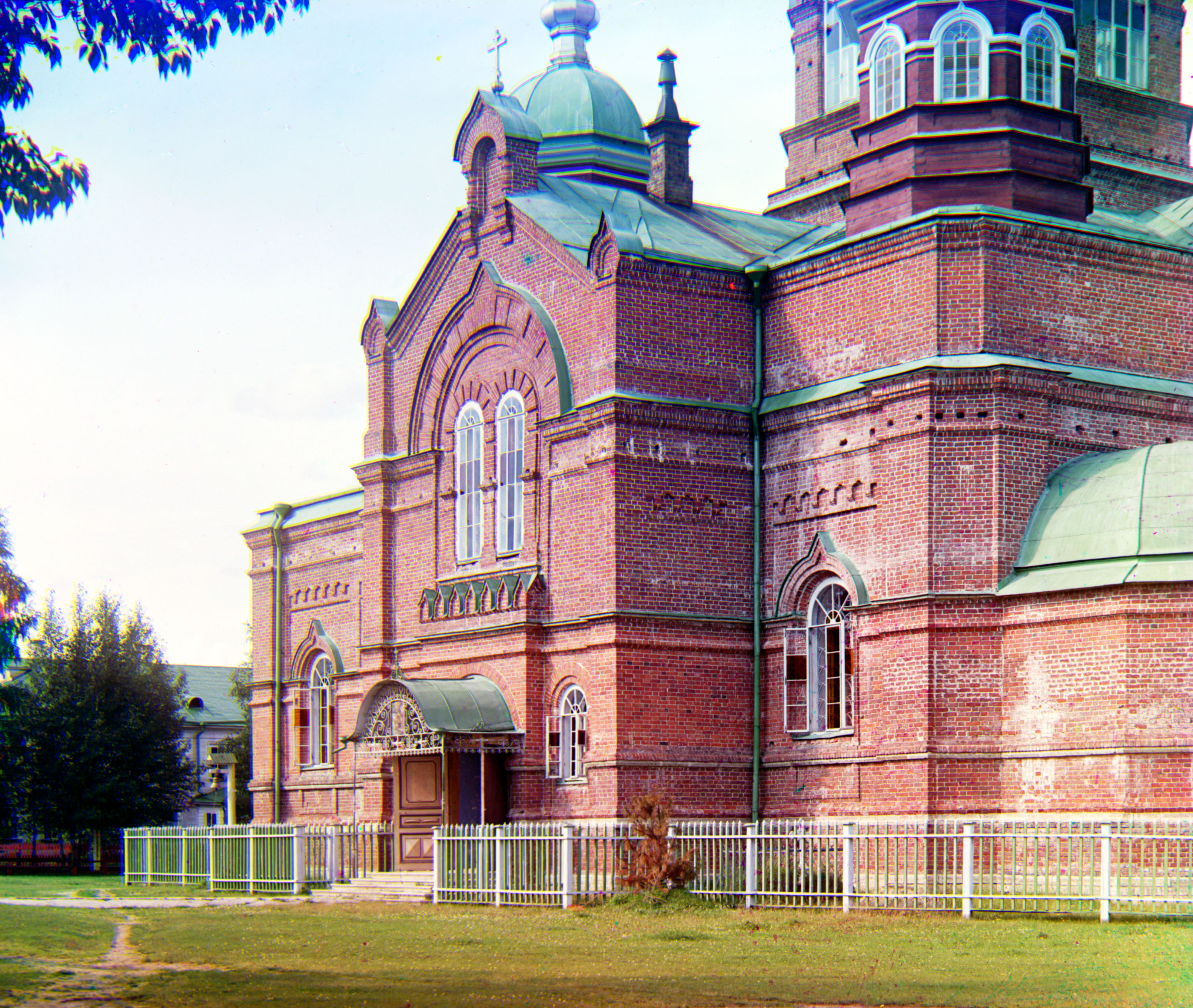 Летний собор в Леушинском монастыре (Леушина, Российская Империя)